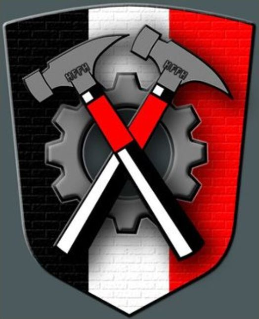 Hammerskins